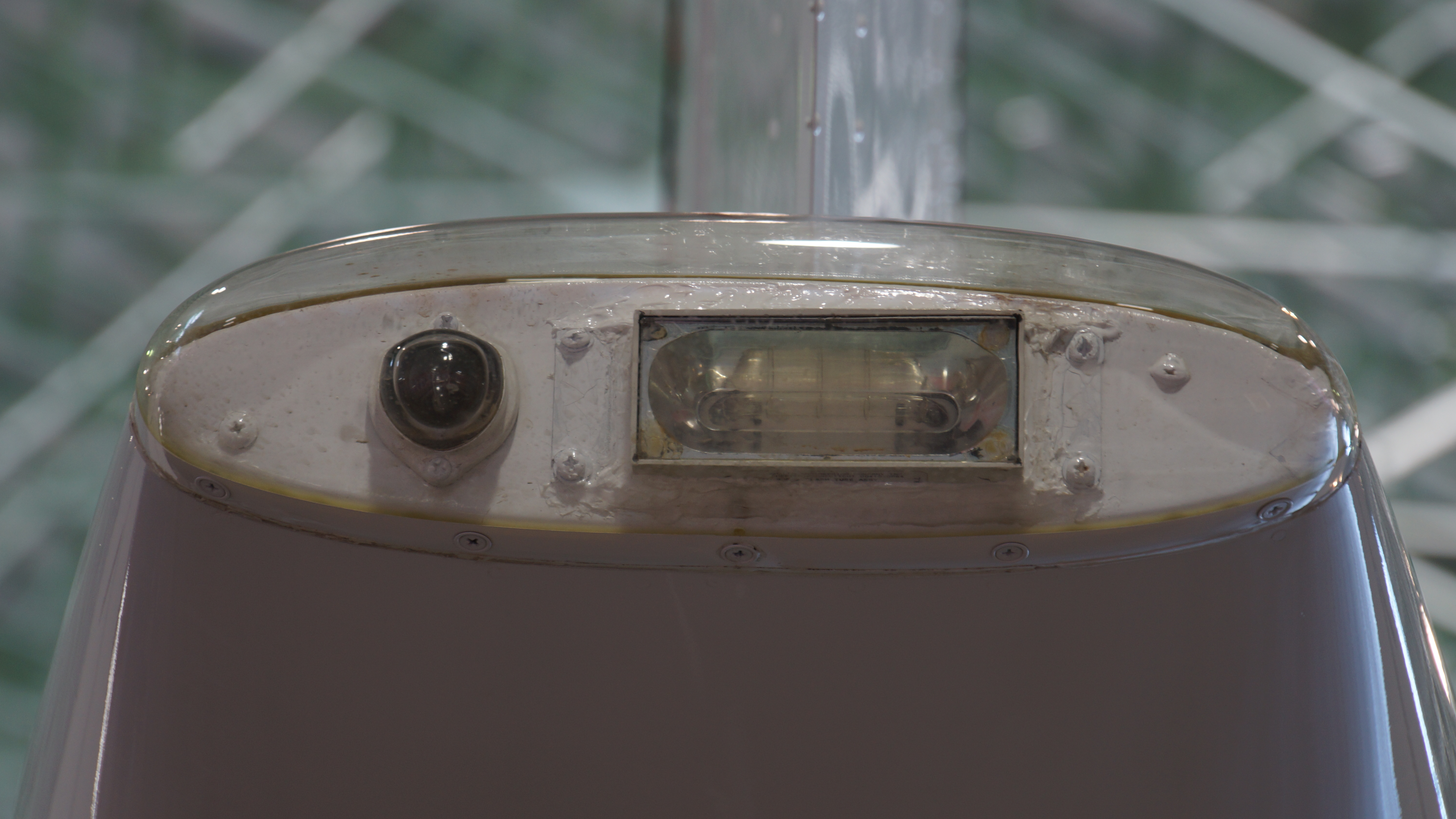 海上自衛隊 TC-90練習機（6832号機） 尾灯。2017年9月30日 徳島航空基地にて。